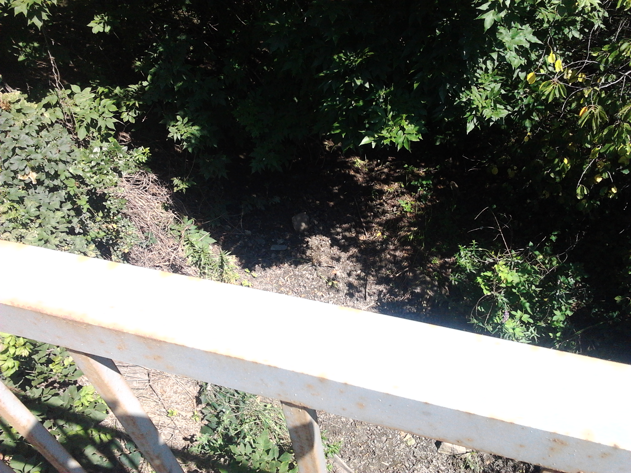 A kiszáradt Novaji-patak medre 2014 júliusában az Andornaktályát Mezőkövesddel összekötő műút hídjáról fotózva.